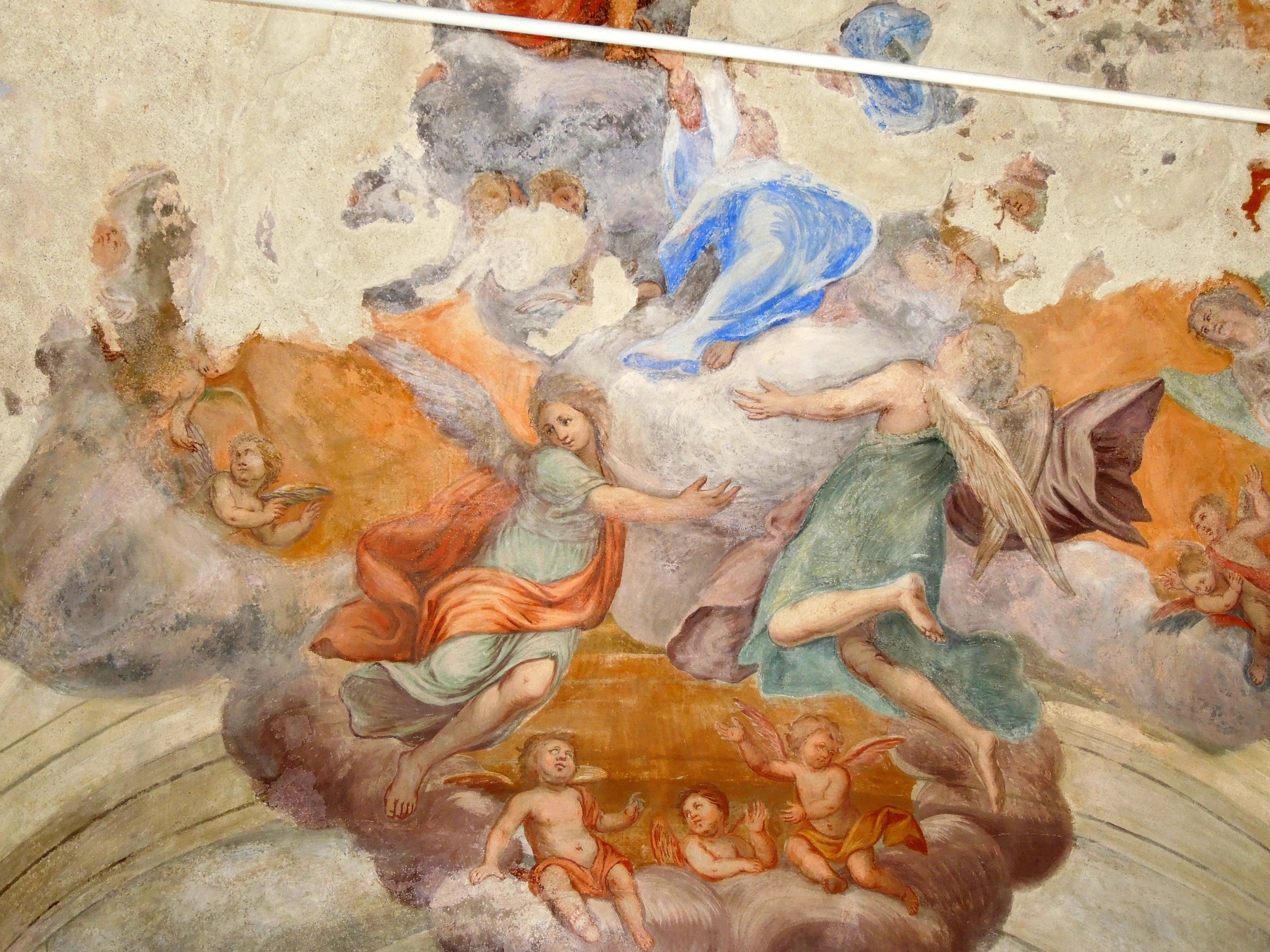 Recupero degli episodi esistenti dell affresco del catino absidale della Santissima Trinita in Cortemilia. Sec. XVII